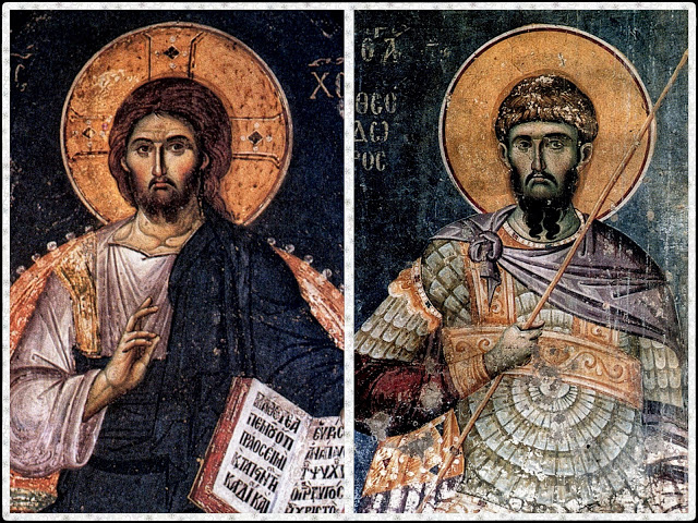 Ο Χριστός Παντοκράτωρ, Άγιος Θεόδωρος ο Τήρων. Τέλη 13ου αιώνα, Άγιον Όρος. Πρωτάτο